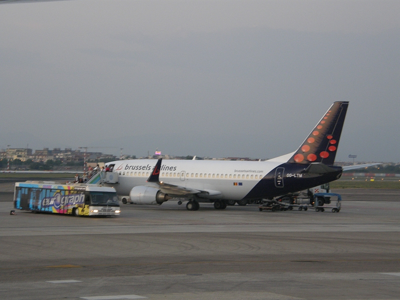 Naples